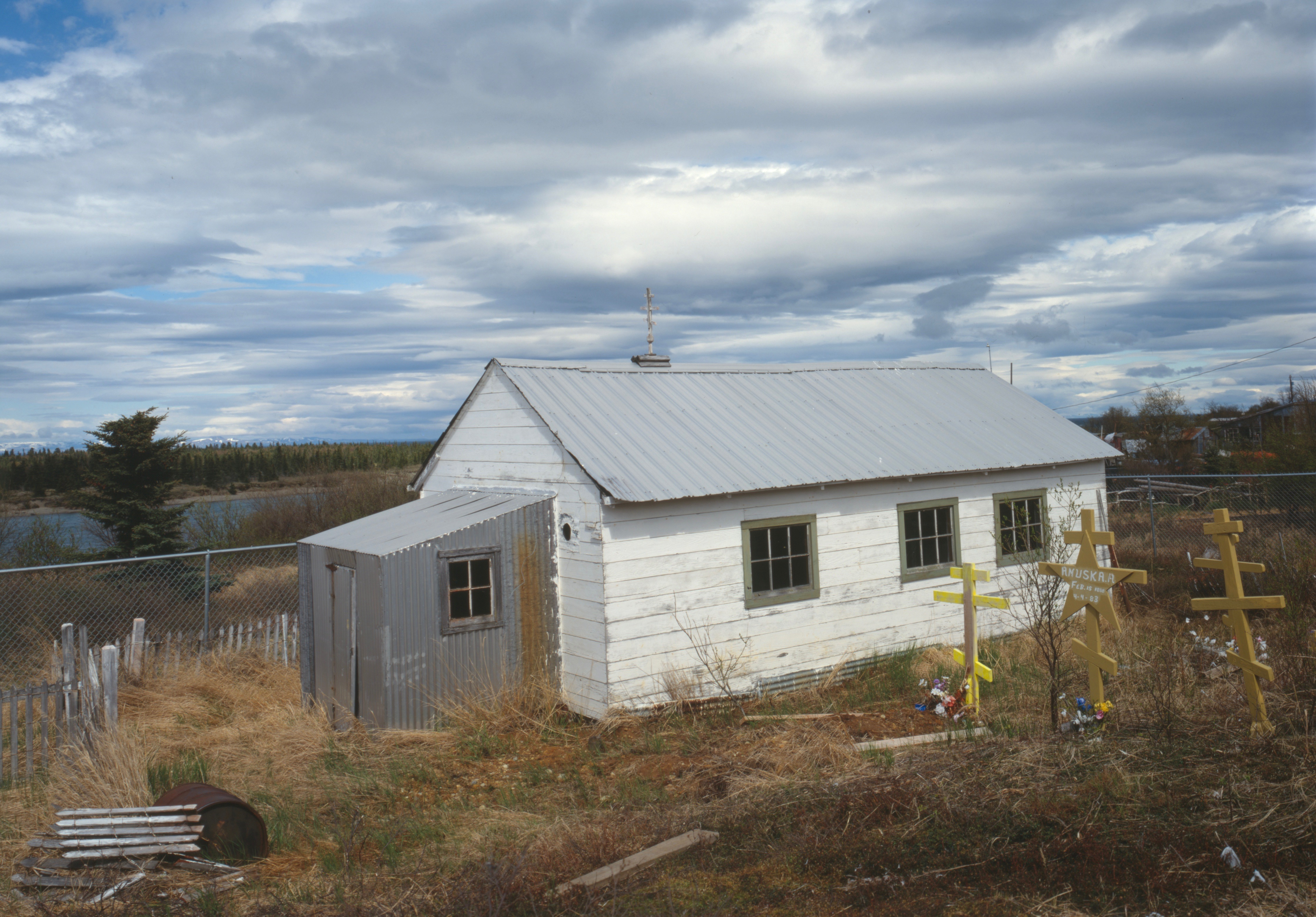 St. Nicholas Church, Igiugig, Alaska